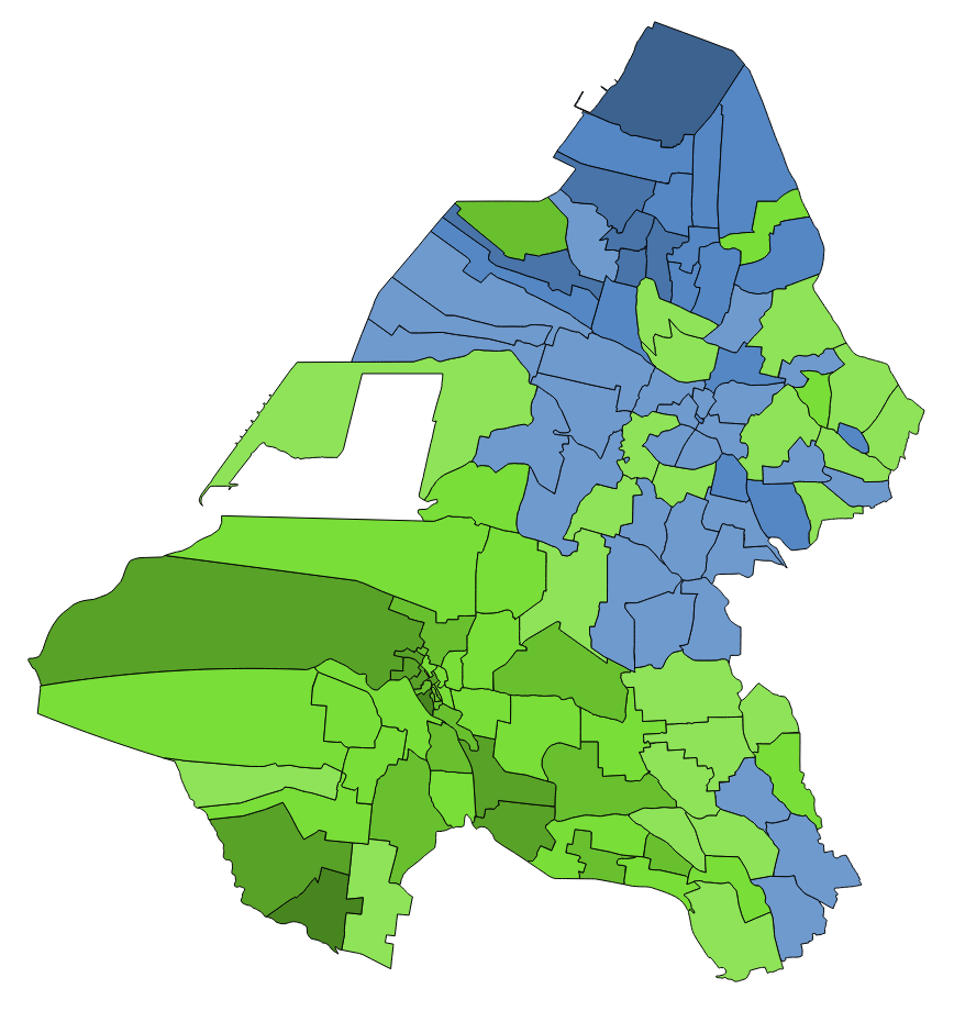 顏色對照表